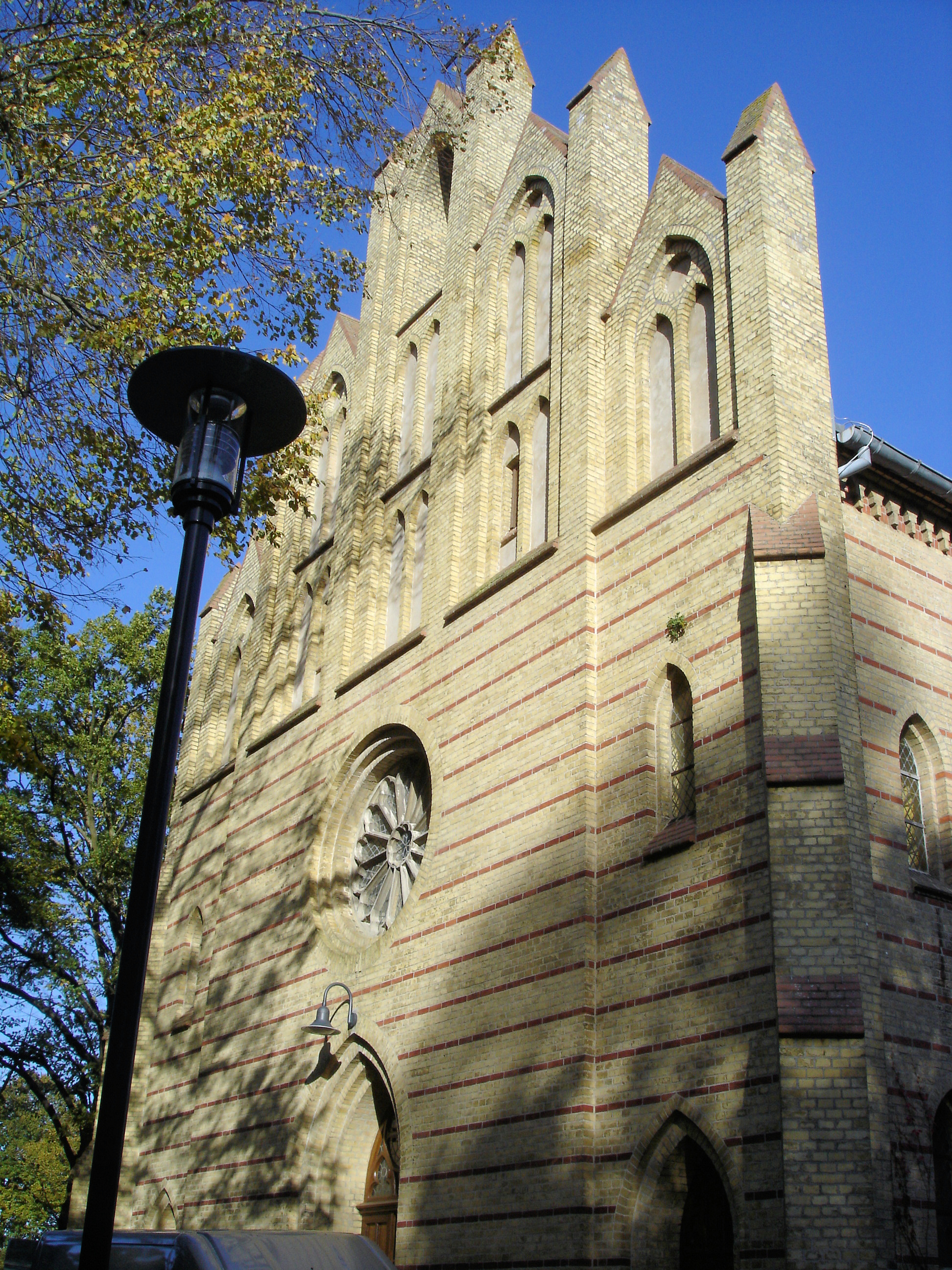 Westgiebel der Peter-Pauls-Kirche in Zingst, Landkreis Nordvorpommern, Mecklenburg-Vorpommern